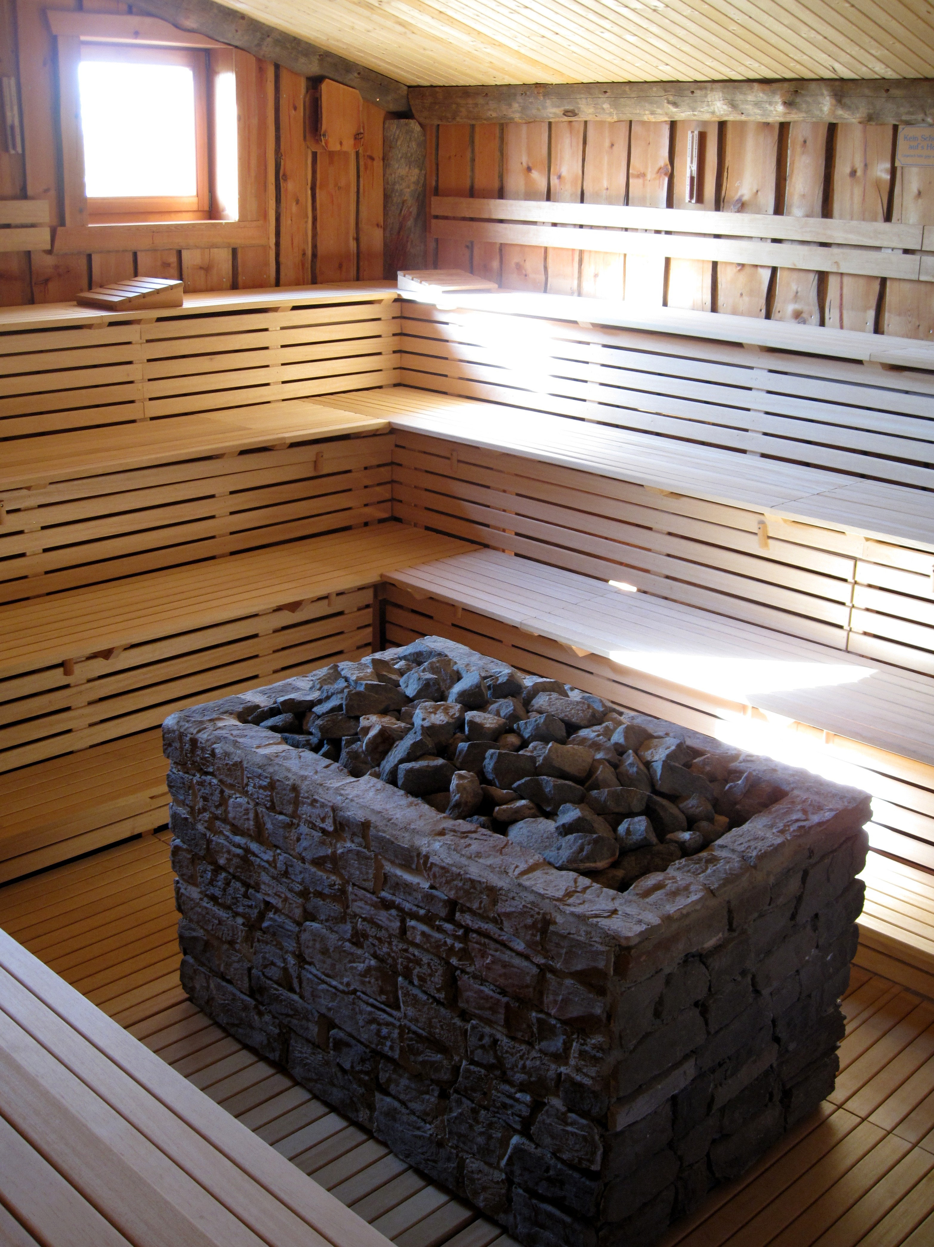 „Galeriesauna“ in der NaturTherme Templin, Templin, Land Brandenburg, Deutschland